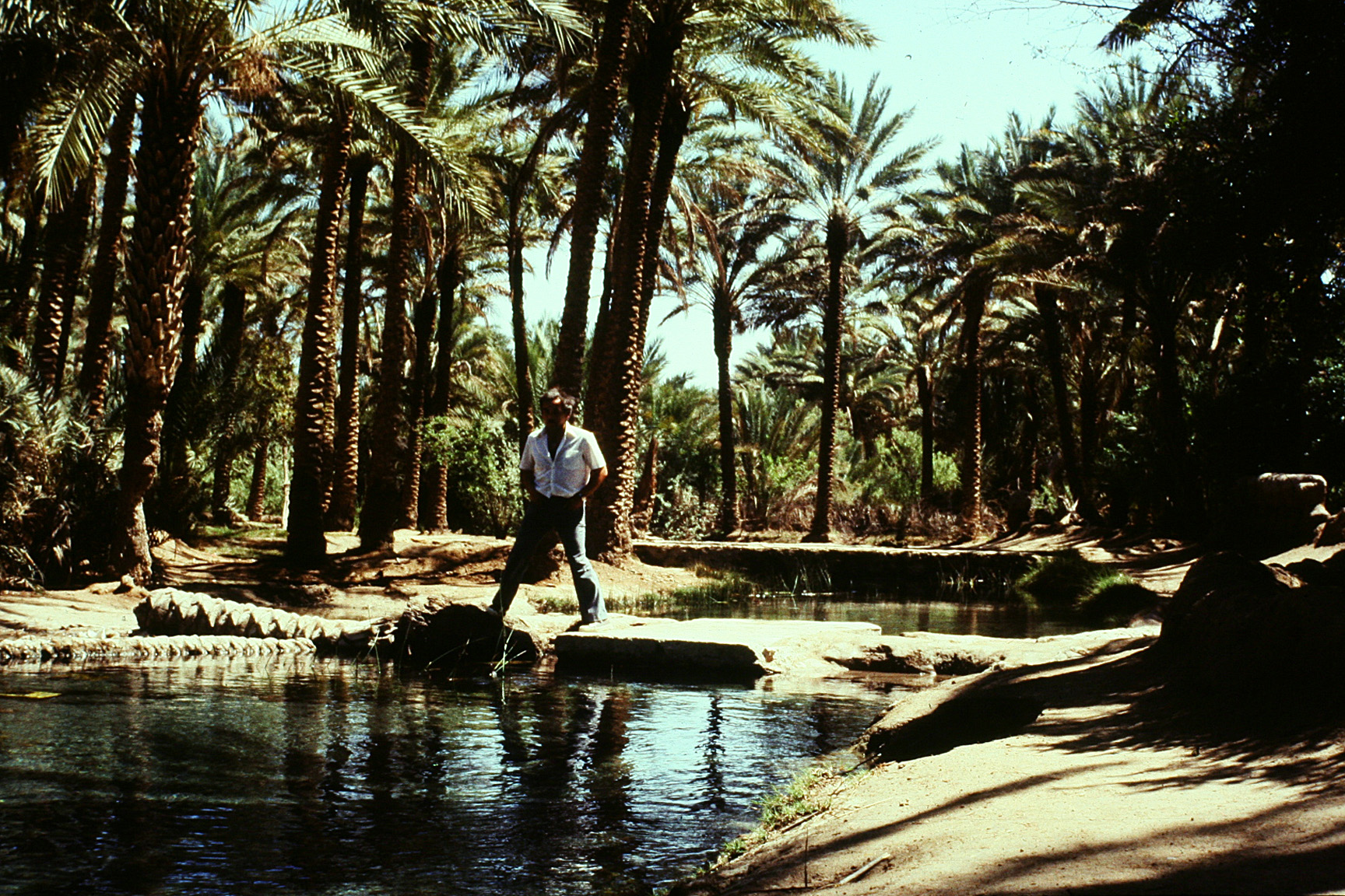 Oaza nad jez. Razaza w Iraku